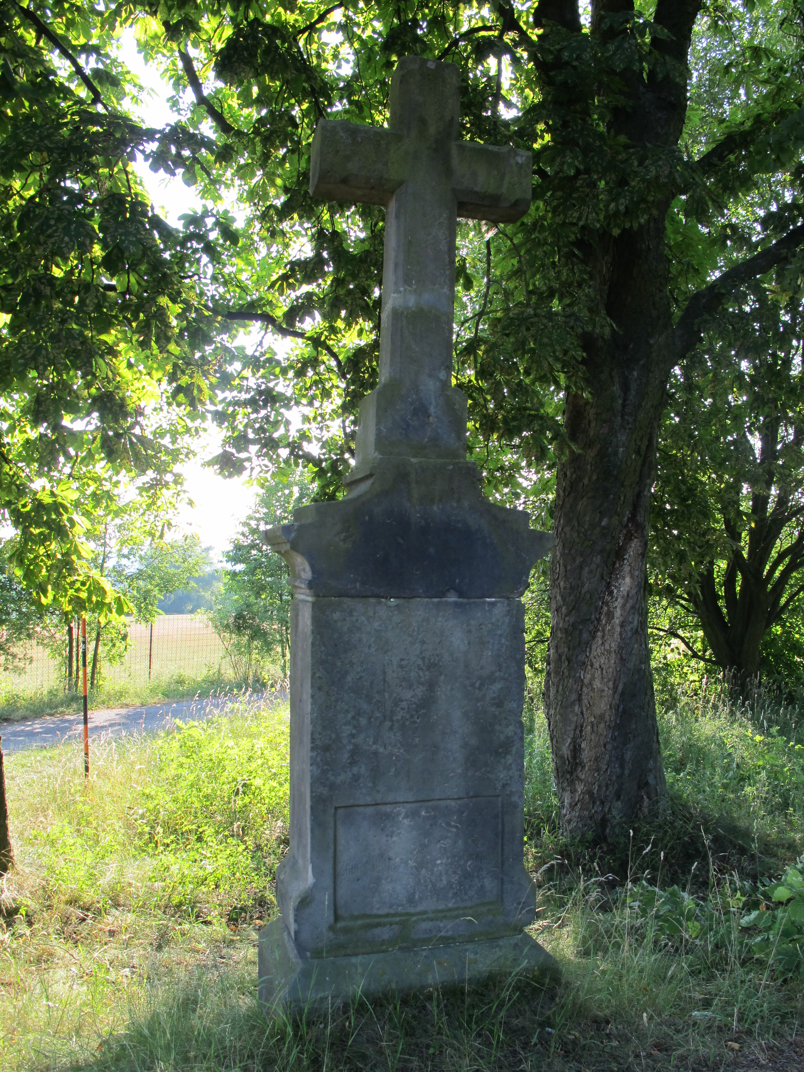 Krucifix, při vsi, Štěpánovice (Rovensko pod Troskami). Zadní strana.